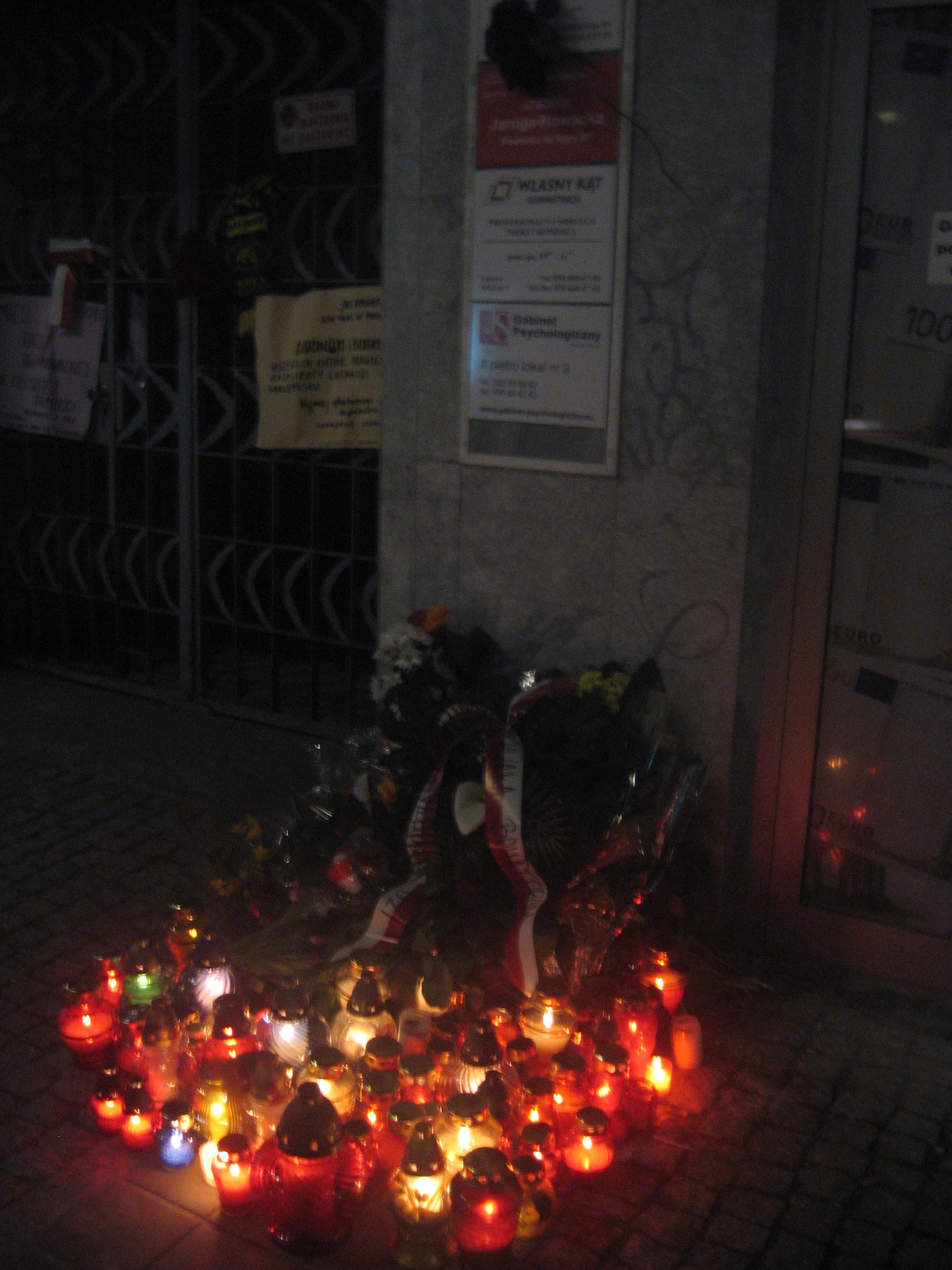 Kwiaty i znicze pod biurem poselskim Izabeli Jarugi-Nowackiej w Gdyni. Česky: Květiny a svíčky před poslaneckou kanceláří Izabely Jarugové-Novacké v Gdyni.